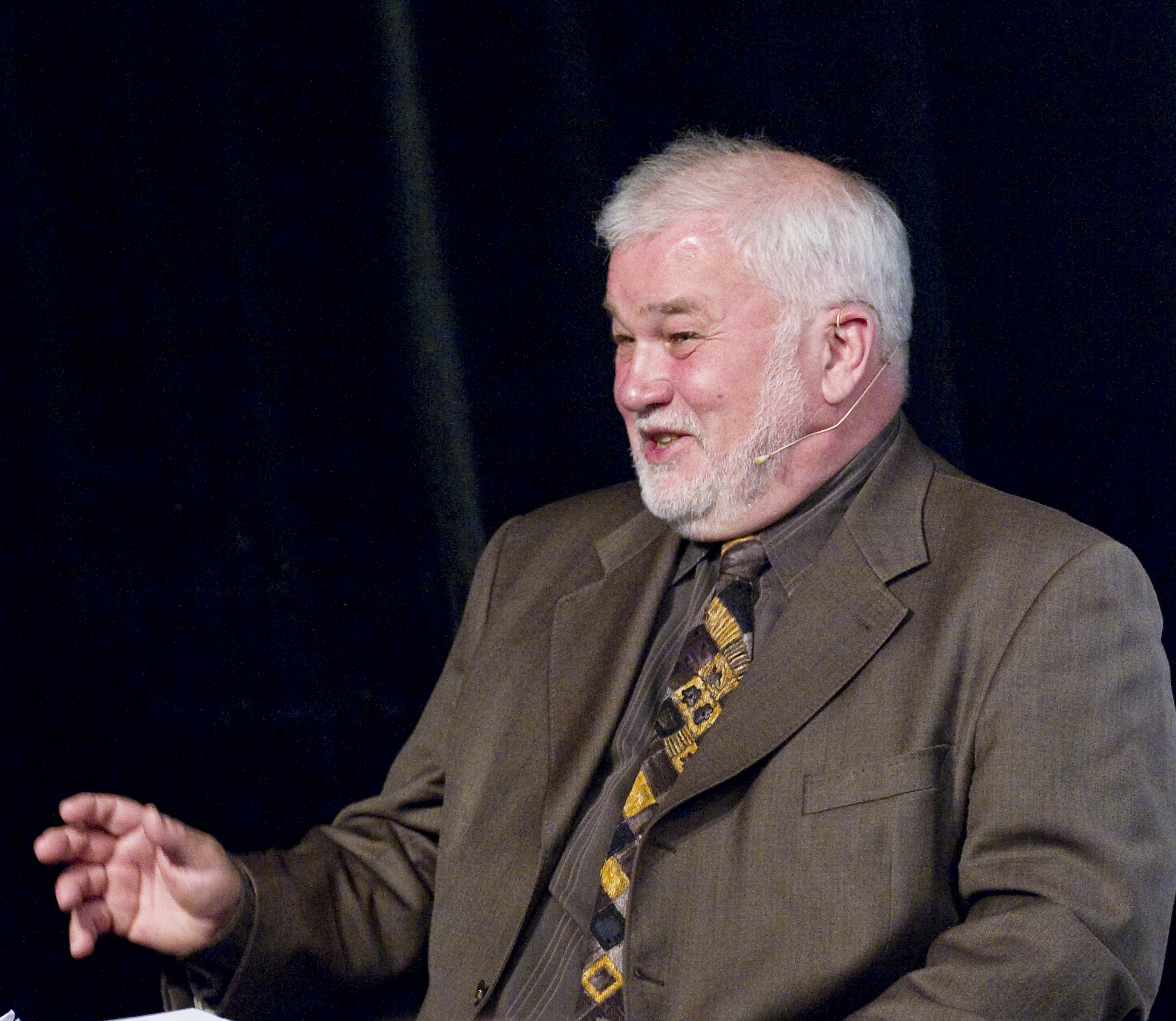 Holbergprisvinner Jürgen Kocka (t.h.) i samtale med festspilldirektør Per Boye Hansen tirsdag.